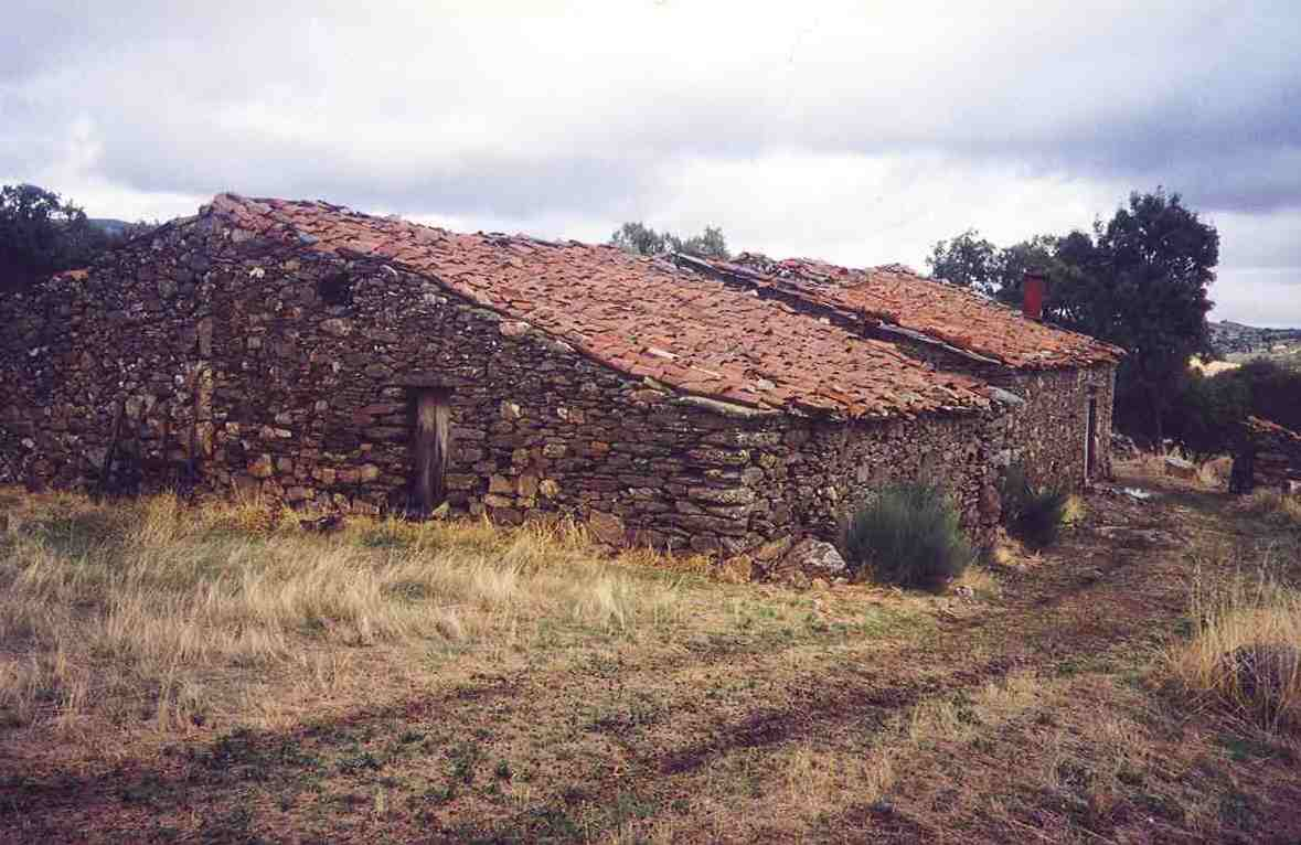 Casa de Pedra, construída em 1647 e ainda habitada em época de colheita. Propriedade da família Parreira, Val da Porca, distrito de Mogadouro, Portugal.